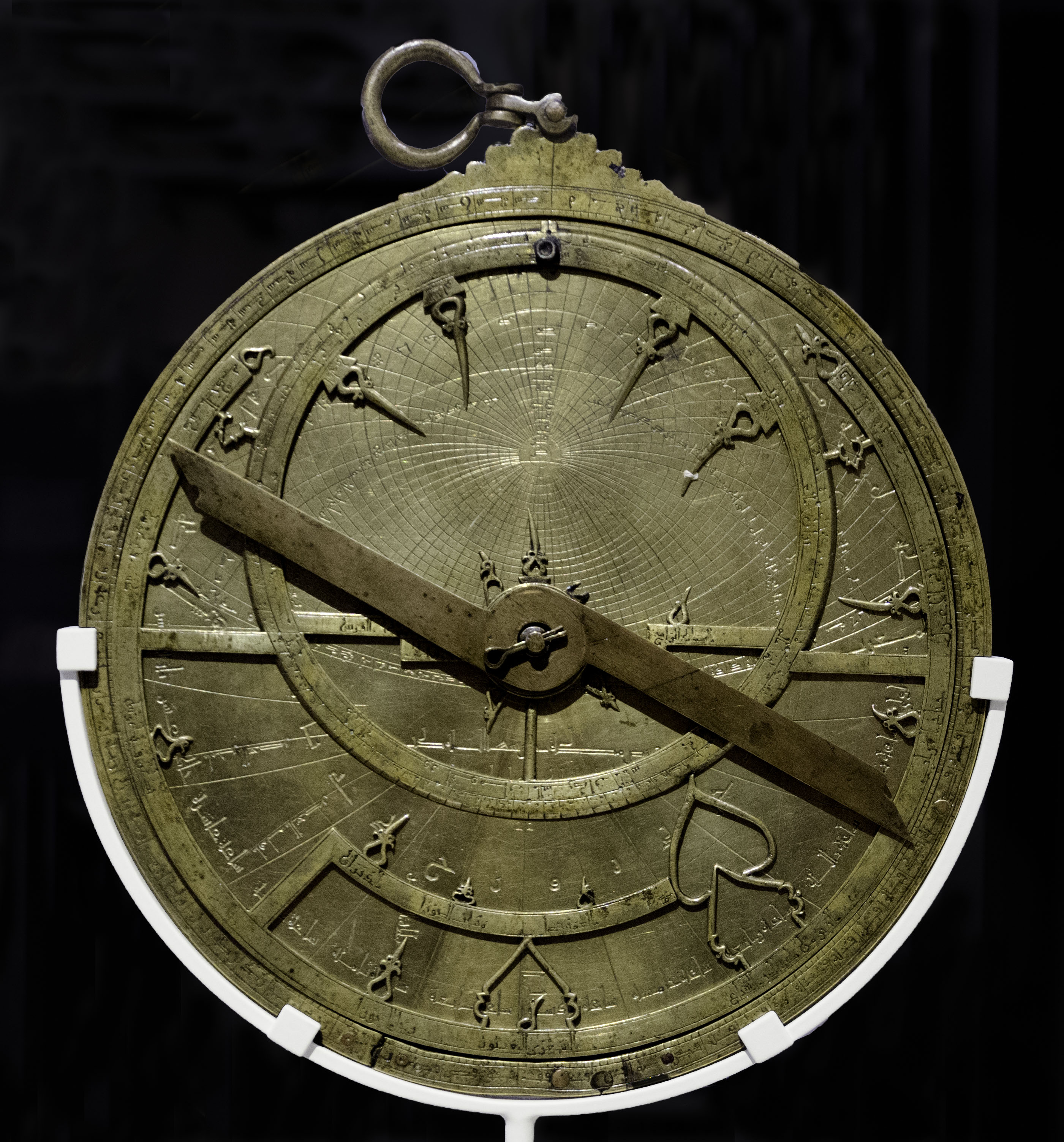 Pieza construida en latón por el matemático Ibrahim ibn Sa'id al-Shali. Está datada en el año 459 de la Hégira, correspondiente a 1067 y fue construida en un taller de Toledo.